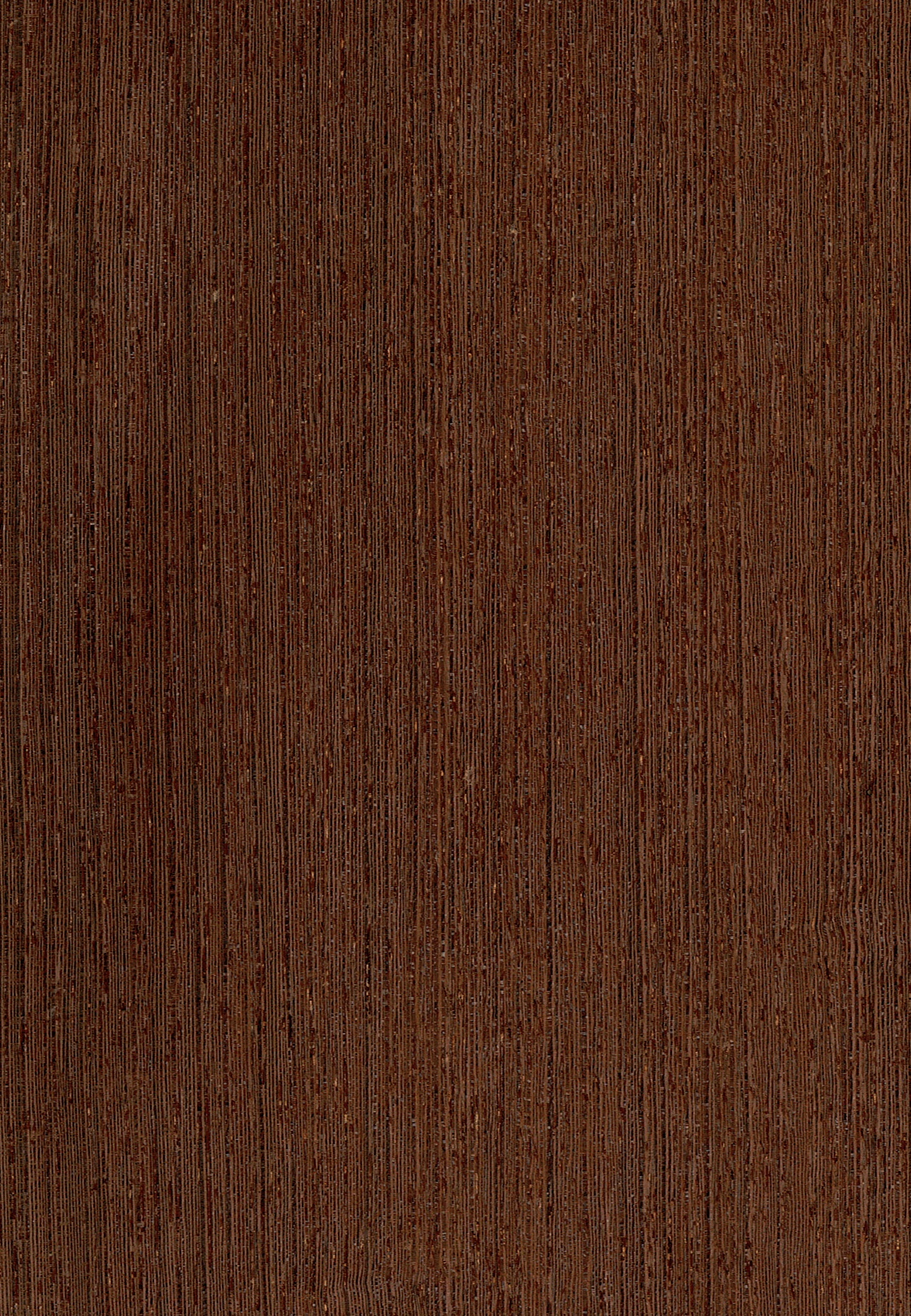 Wenge